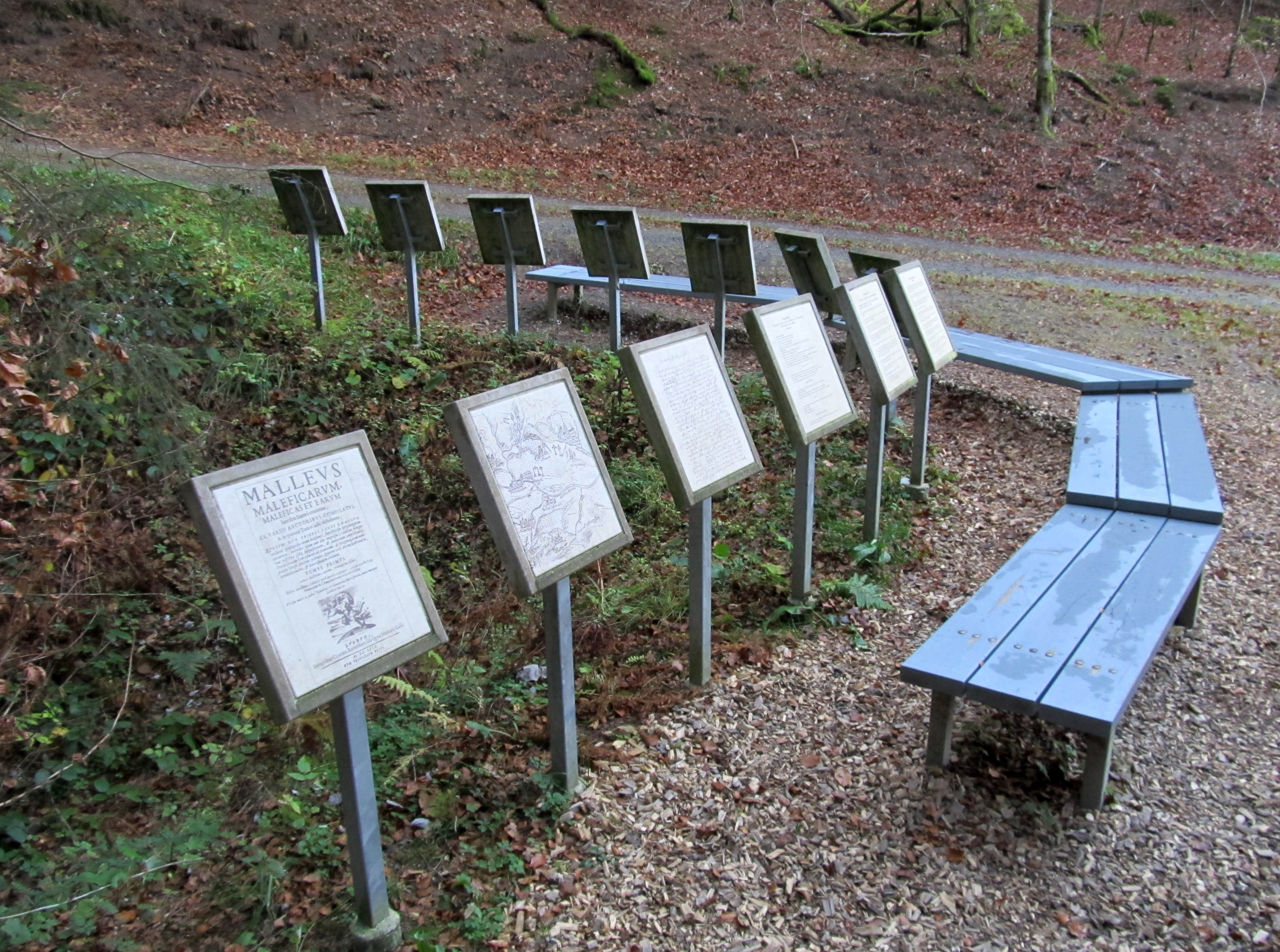 Der Hexenplatz - Verhörplatz (von Lilli Fischer), Waldskulpturenweg Wittgenstein−Sauerland, Schmallenberg-Oberkirchen, Germany.